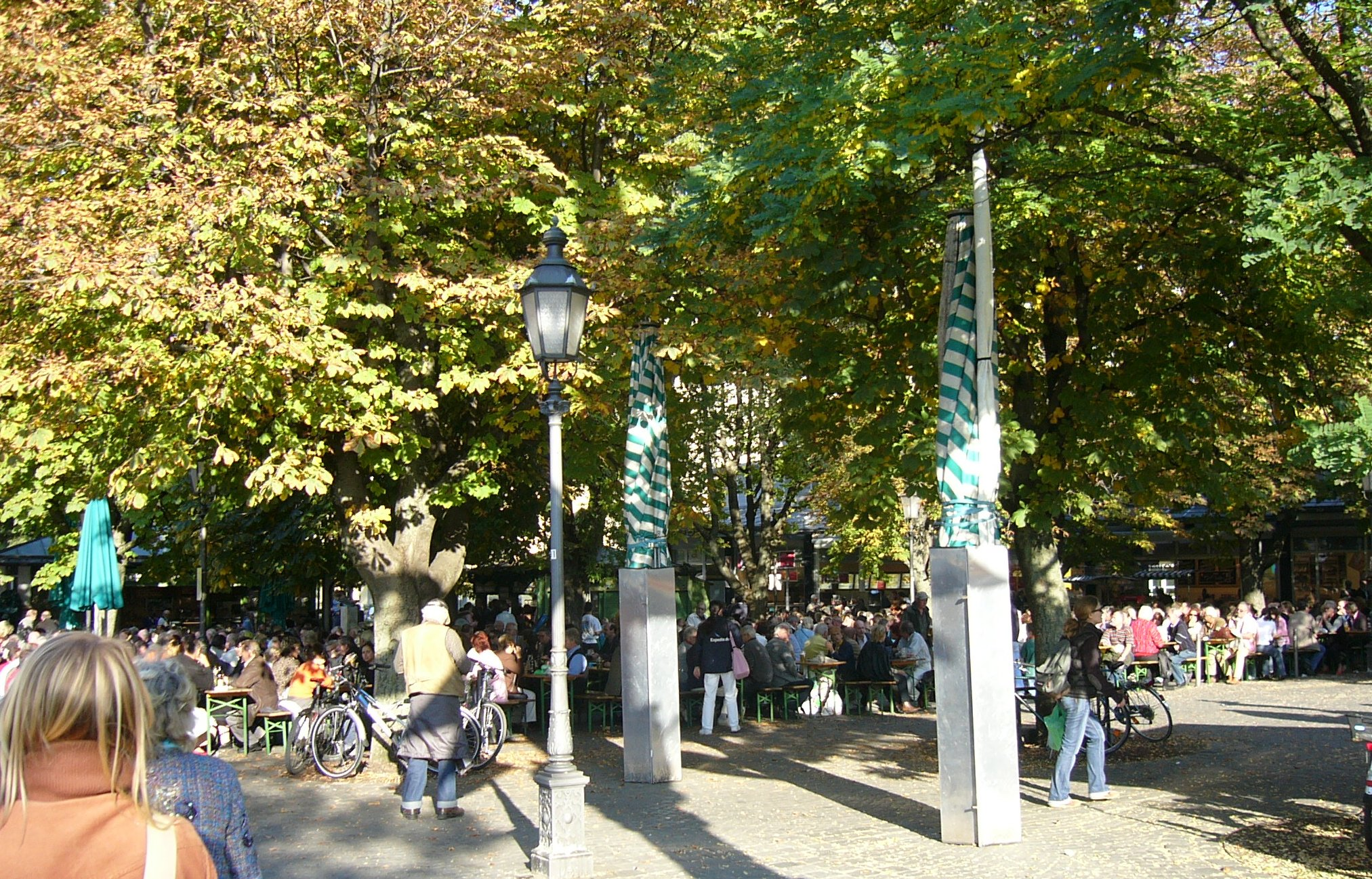 Munich